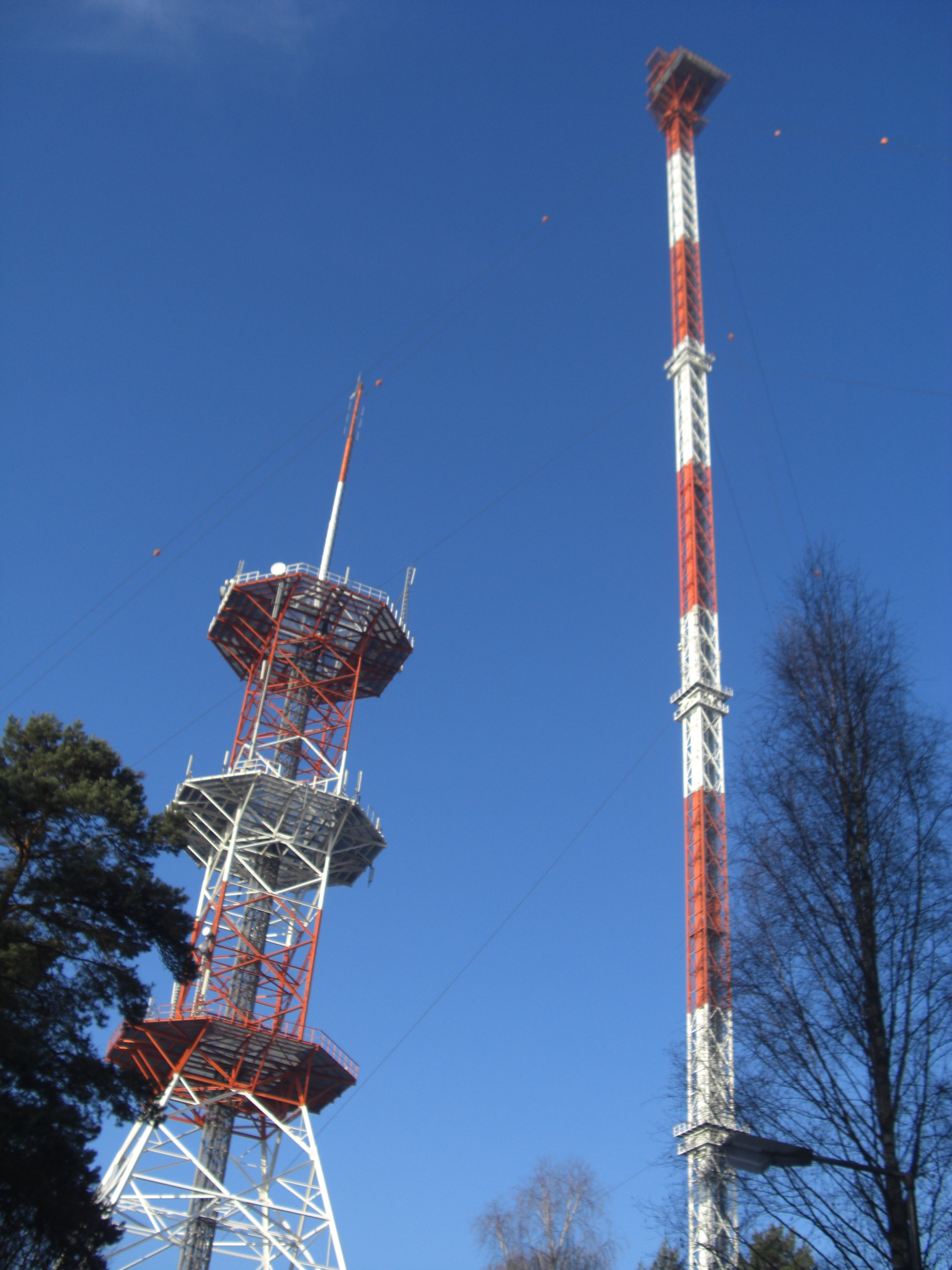 Funkturm Frohnau im Frühjahr 2009